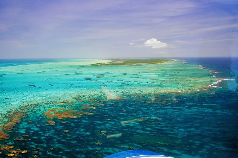 Anegada